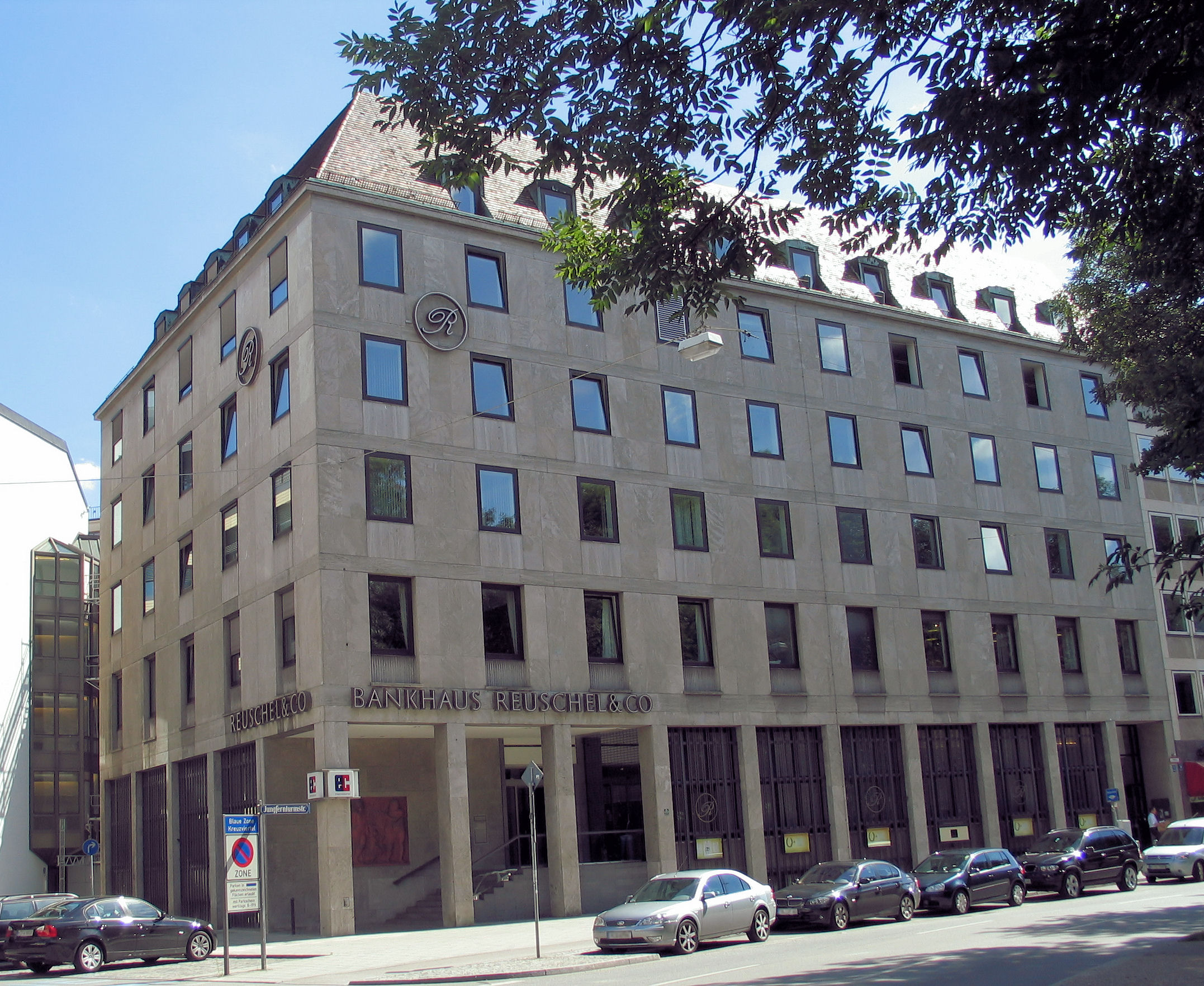 Ehemaliger Stammsitz Bankhaus Reuschel & Co., Maximiliansplatz 13